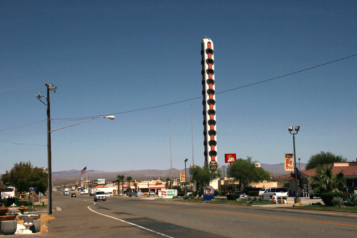 Der Baker Boulevard in Baker, CA. Das "World's tallest thermometer" erinnert an die mit 134°F (57°C) höchste jemals in den USA gemessene Temperatur. Im Moment zeigt es eine Temperatur von exakt 100°F (38°C) an.